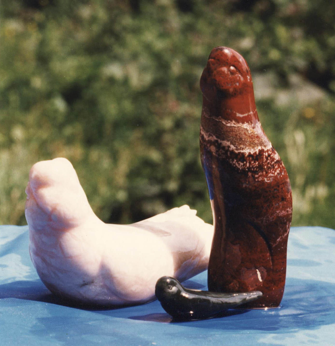 Работа скульптора-художника Николаева Е.В.